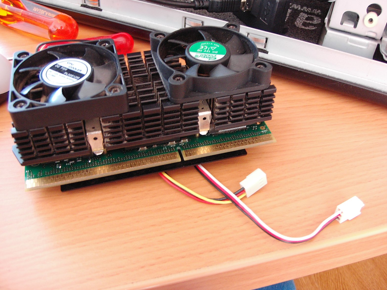 Procesador Pentium 3 (800 Mhz), con conexión Slot 1, con disipador y con dos ventiladores. Los dos cables que salen son uno para cada ventilador. El autor de la foto soy yo, y la pongo en dominio público.